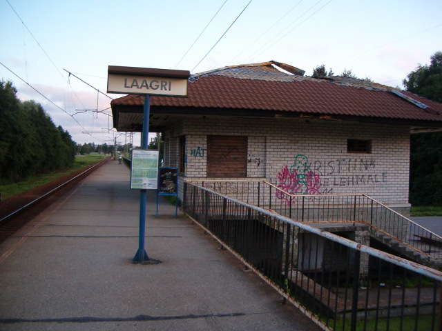 Laagri raudteepeatus